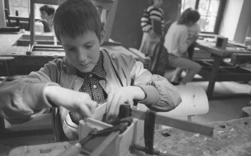 Juni 1988 Bonn: Gymnasium- Kunst- und Werkunterricht